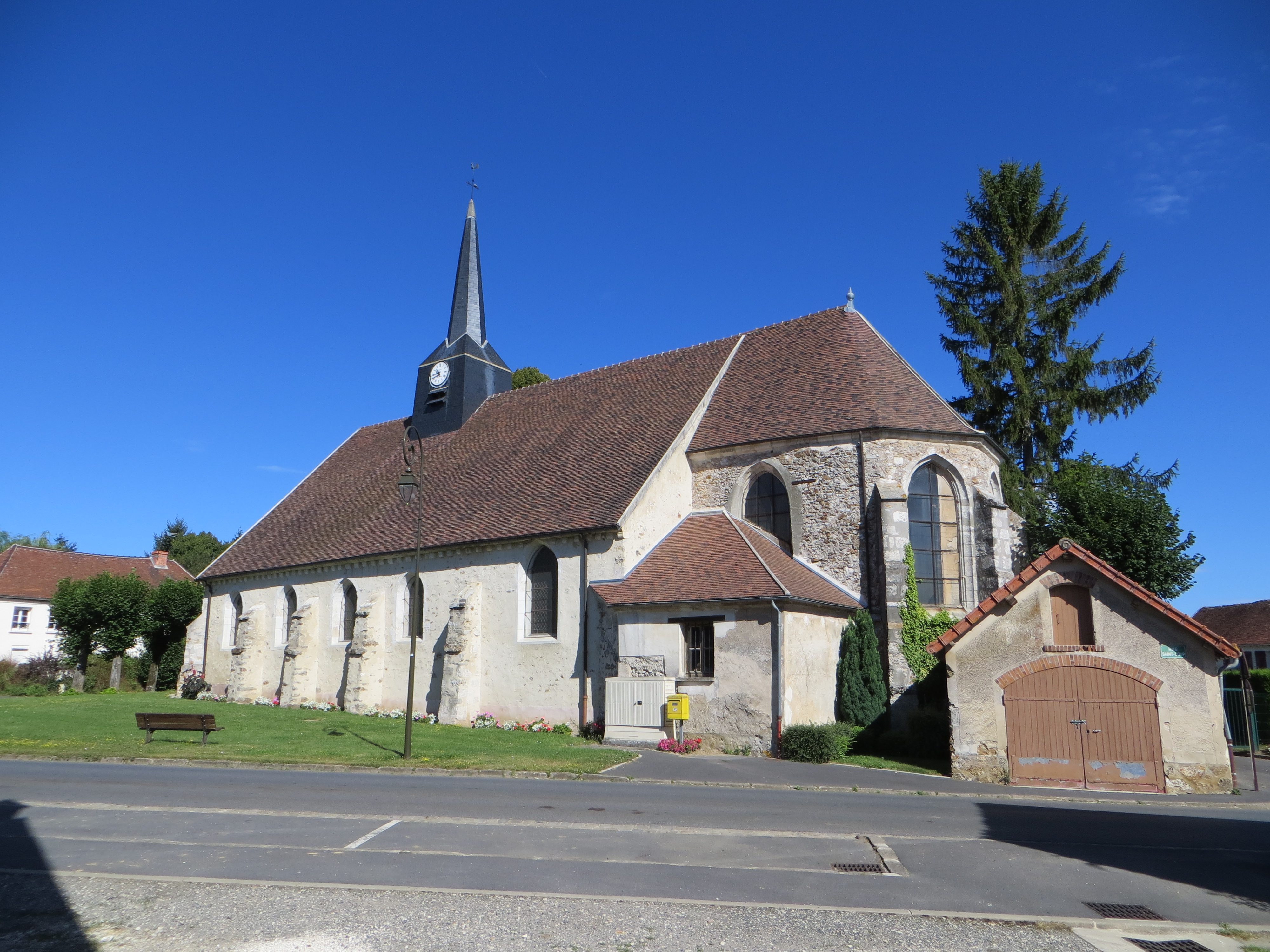 Vue générale de l'église